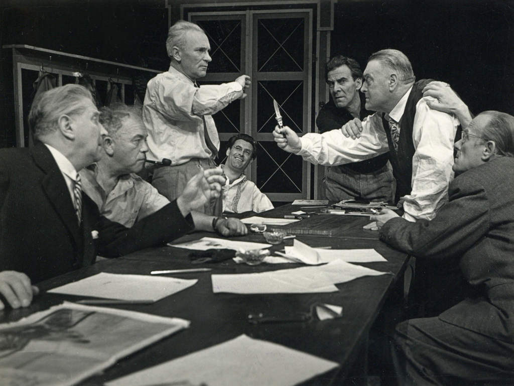 Horst Budjuhn, Reginald Rose, Dvanajst porotnikov, Drama SNG v Ljubljani. Na fotografiji: Edvard Gregorin (Št. 9), Pavle Kovič (Št. 10), Ivan Jerman (Št. 11), Boris Kralj (Št. 12), Jože Zupan (Predsednik), Janez Cesar (Št. 3), Maks Furijan (Št. 4).